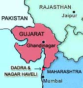 Indien, Dadra & Nagar Haveli, karta, egen tillv.